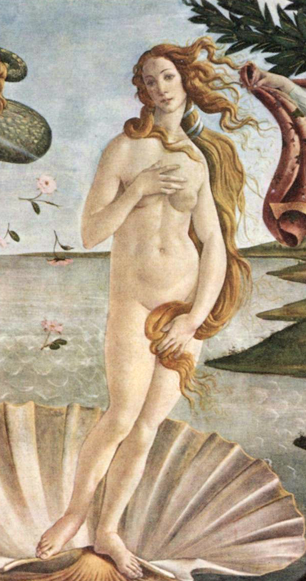 Fig. 121. — La Vénus de Botticelli